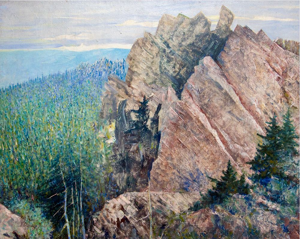 картина художника Девлеткильдеева Касима (1887—1947). Южный Урал